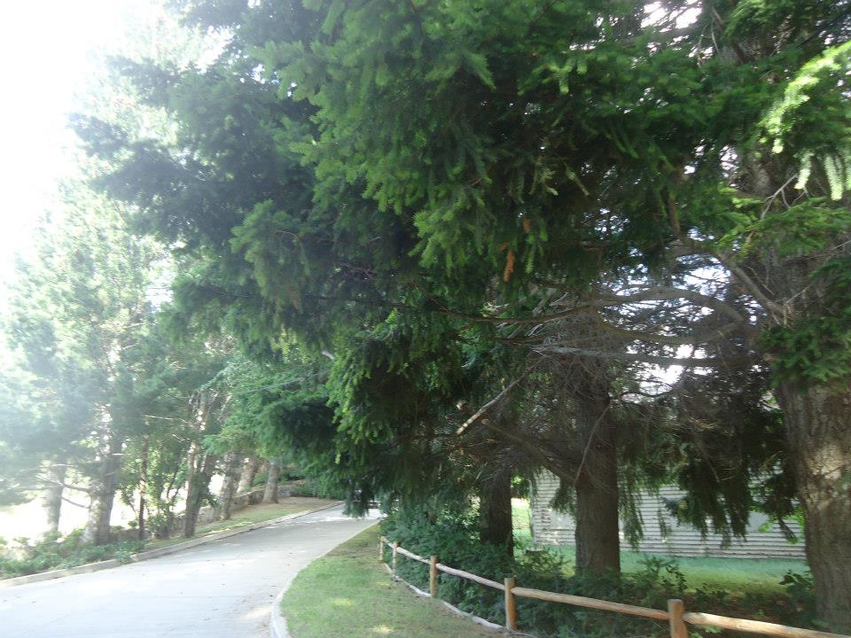 Un hermoso paisaje